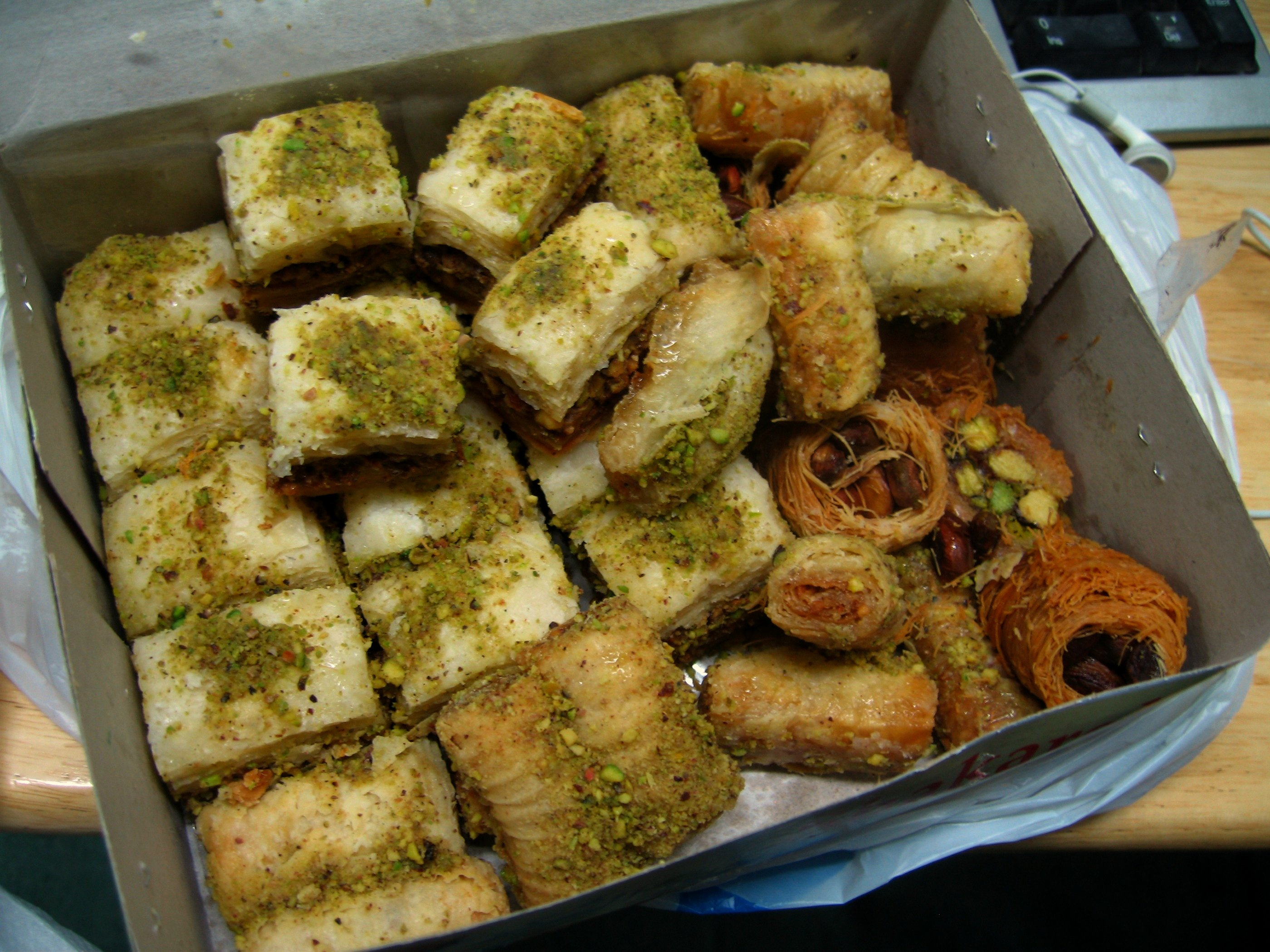 Baklava